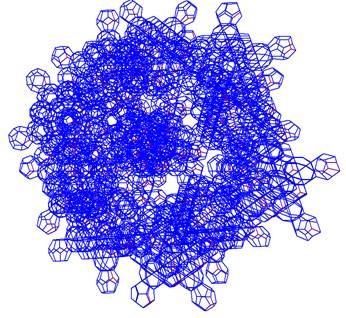 Ikozi-ikozaéderekből épült csillag